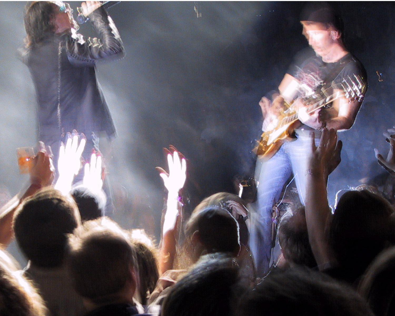 U2 in concert